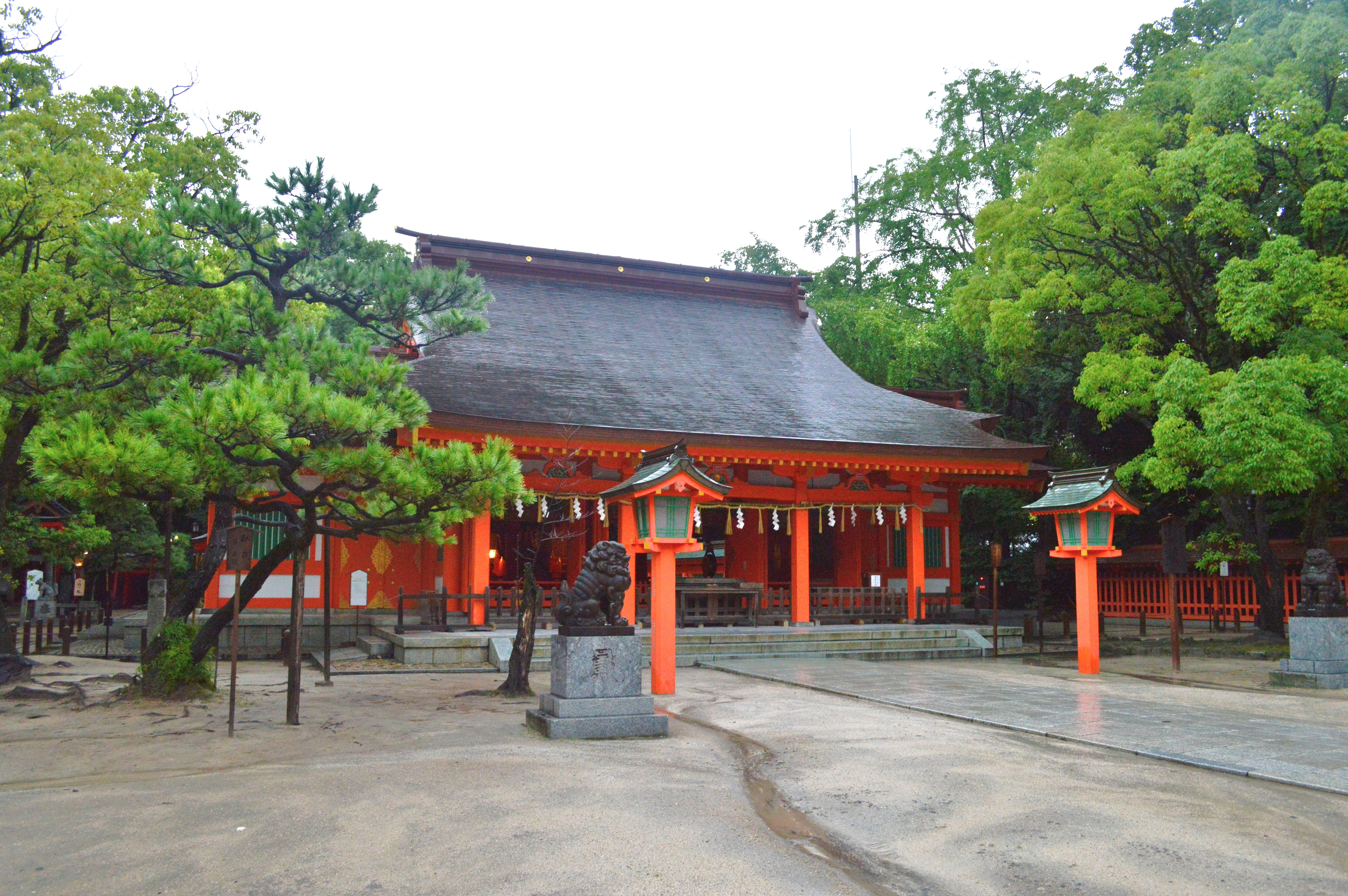 住吉神社 (福岡市) 拝殿